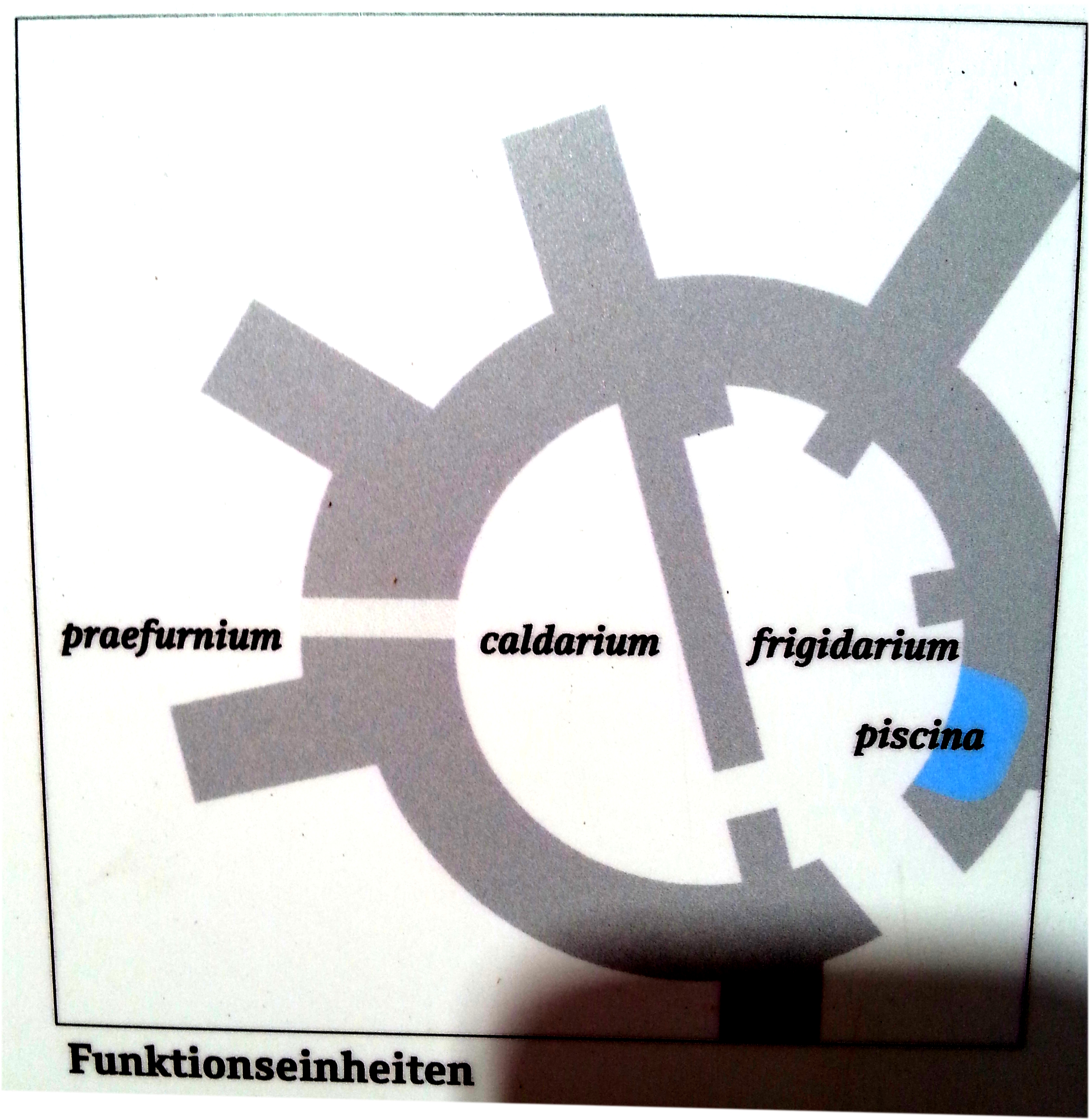 Burgus Oberranna (A): Befundskizze der Badeanlage im SW-Turm.